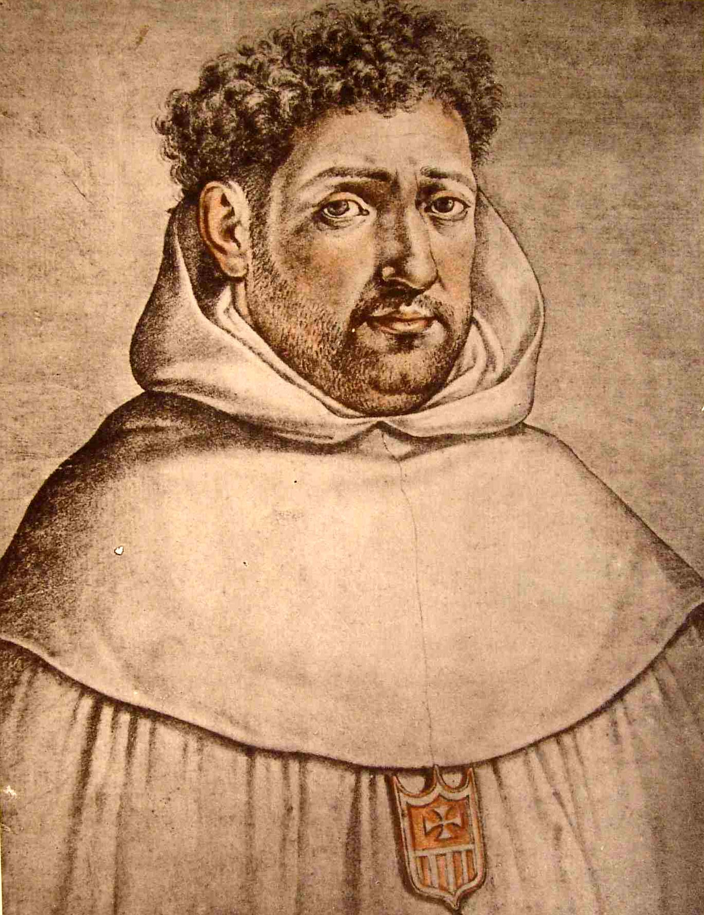 "Francisco de Ribera". Puede acceder al libro completo en el siguiente enlace : Libro de descripción de verdaderos retratos de ilustres y memorables varones / escrito y dibujado por Francisco Pacheco. - Sevilla : Libreria Española y Extrangera de D. Rafael Tarasco, s.a